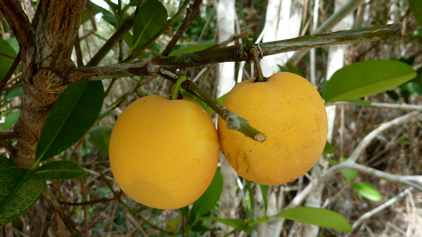 Garcinia gardneriana (Planch. & Triana) Zappi